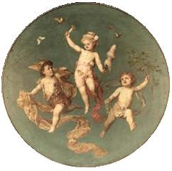 Deckengemälde